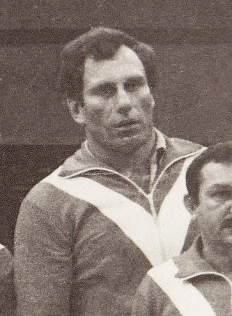 Nikolay Balboshin